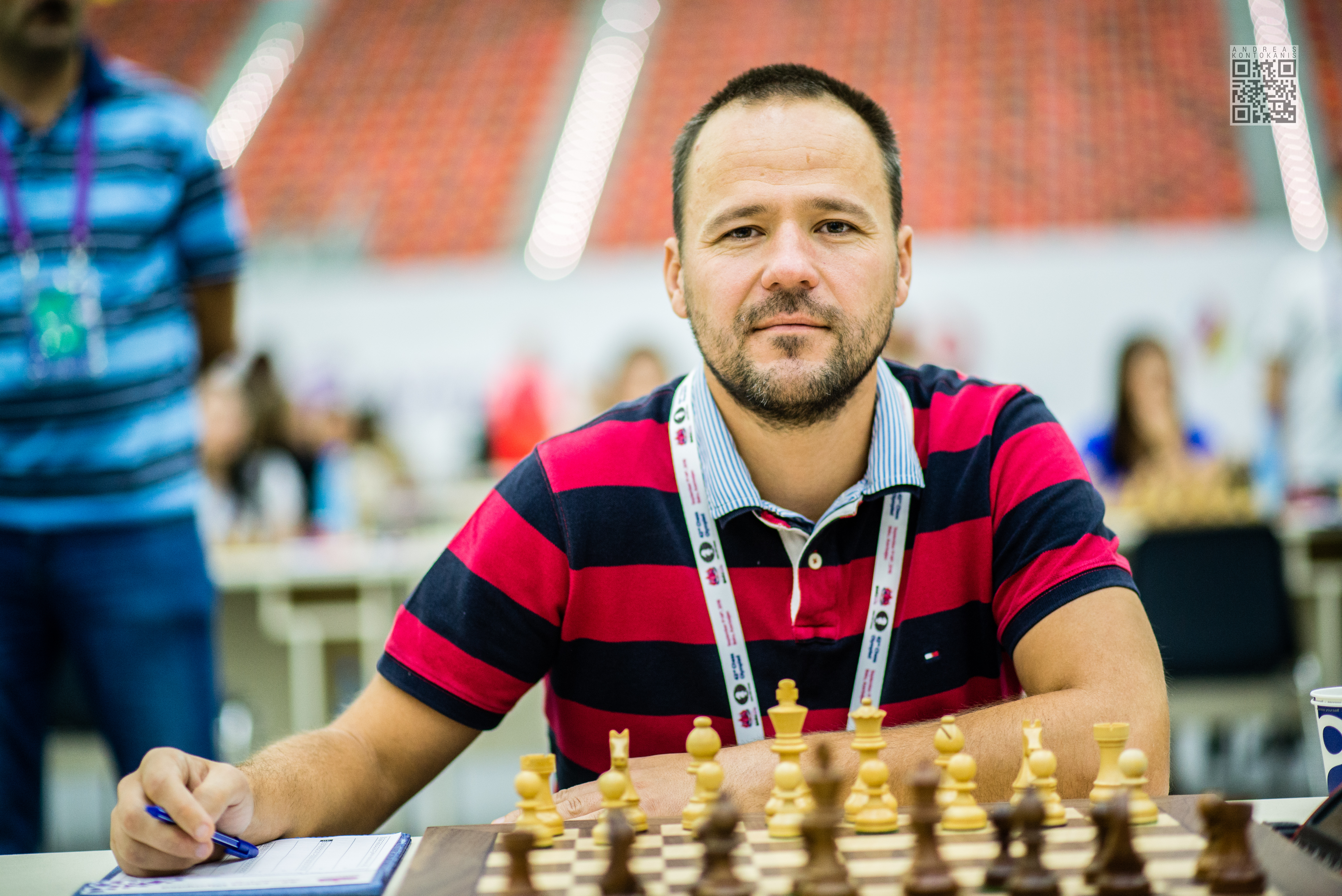 Svetushkin Dmitry